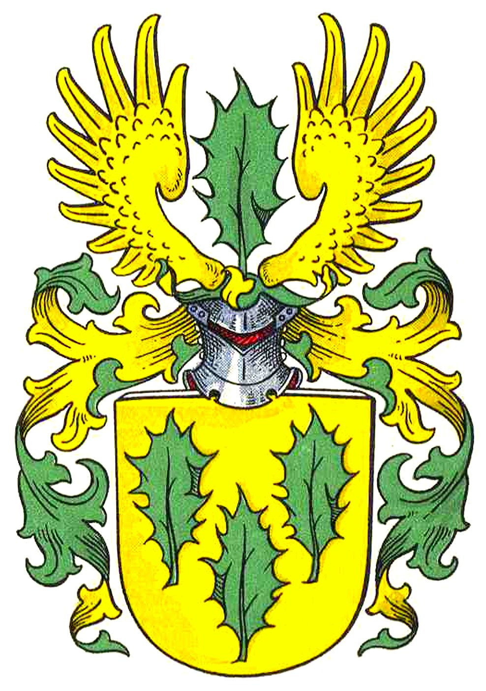 Wappen Amsinck zwei über einem Hülsenblatt/Stechpalme, Heizer, das grüne Hülsenblatt inmitten eines goldenen Fluges